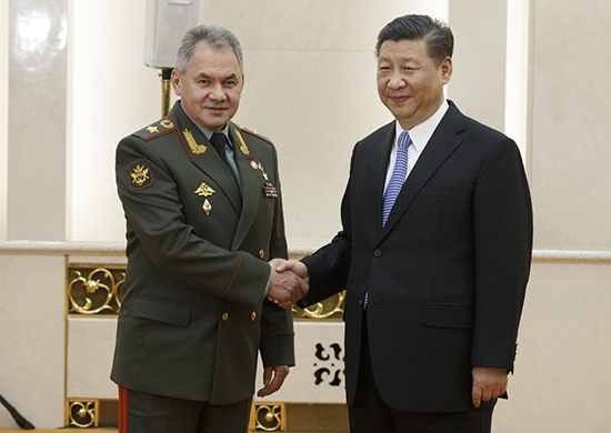 Во время встречи руководителей оборонных ведомств России, Индии, Казахстана, Киргизии, Китая, Пакистана, Таджикистана и Узбекистана с Председателем Китайской Народной Республики. Министр обороны России Сергей Шойгу и Председатель Китайской Народной Республик Си Цзиньпин